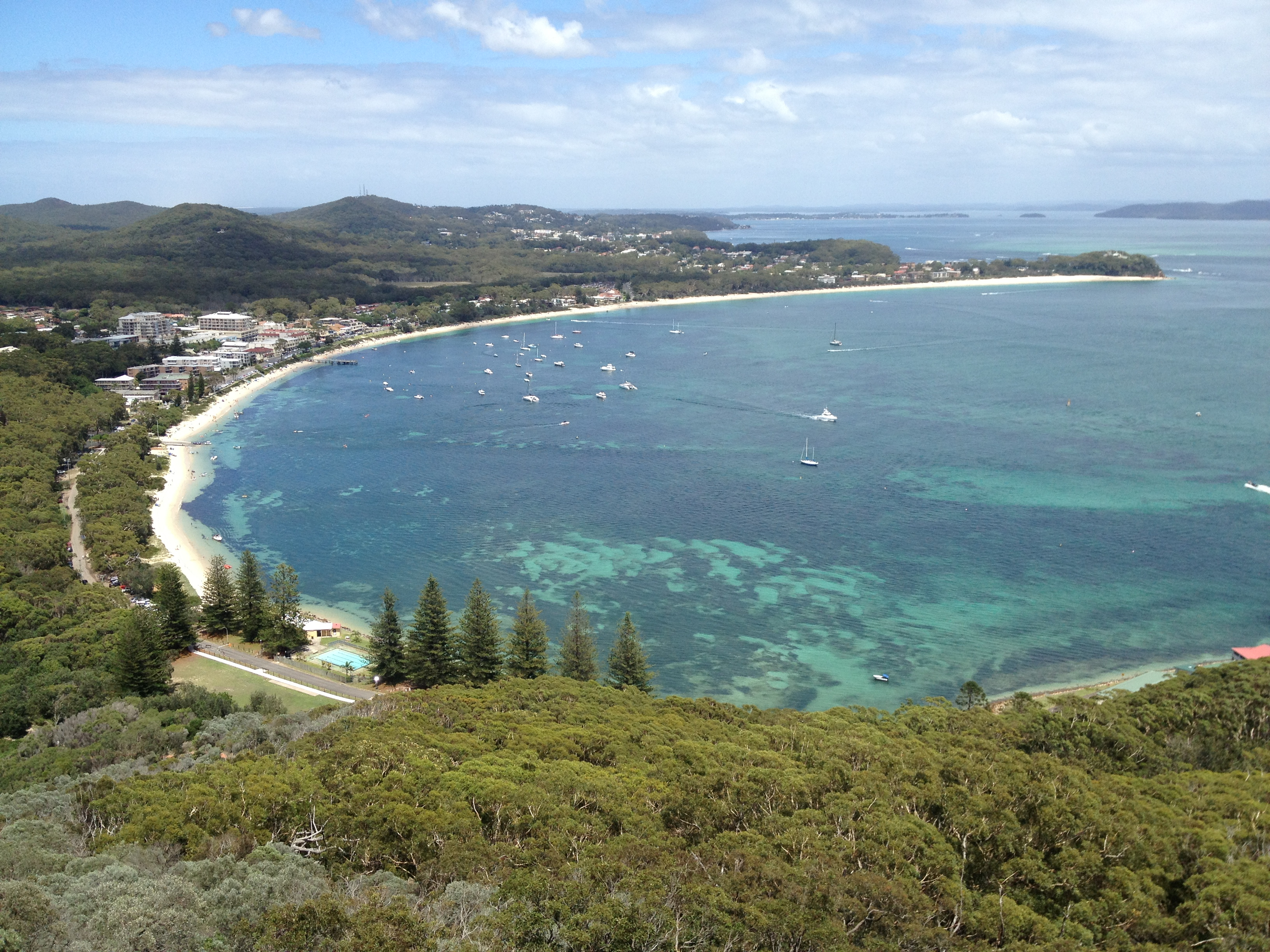 Shoal Bay